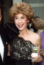 Betsy Bloomingdale